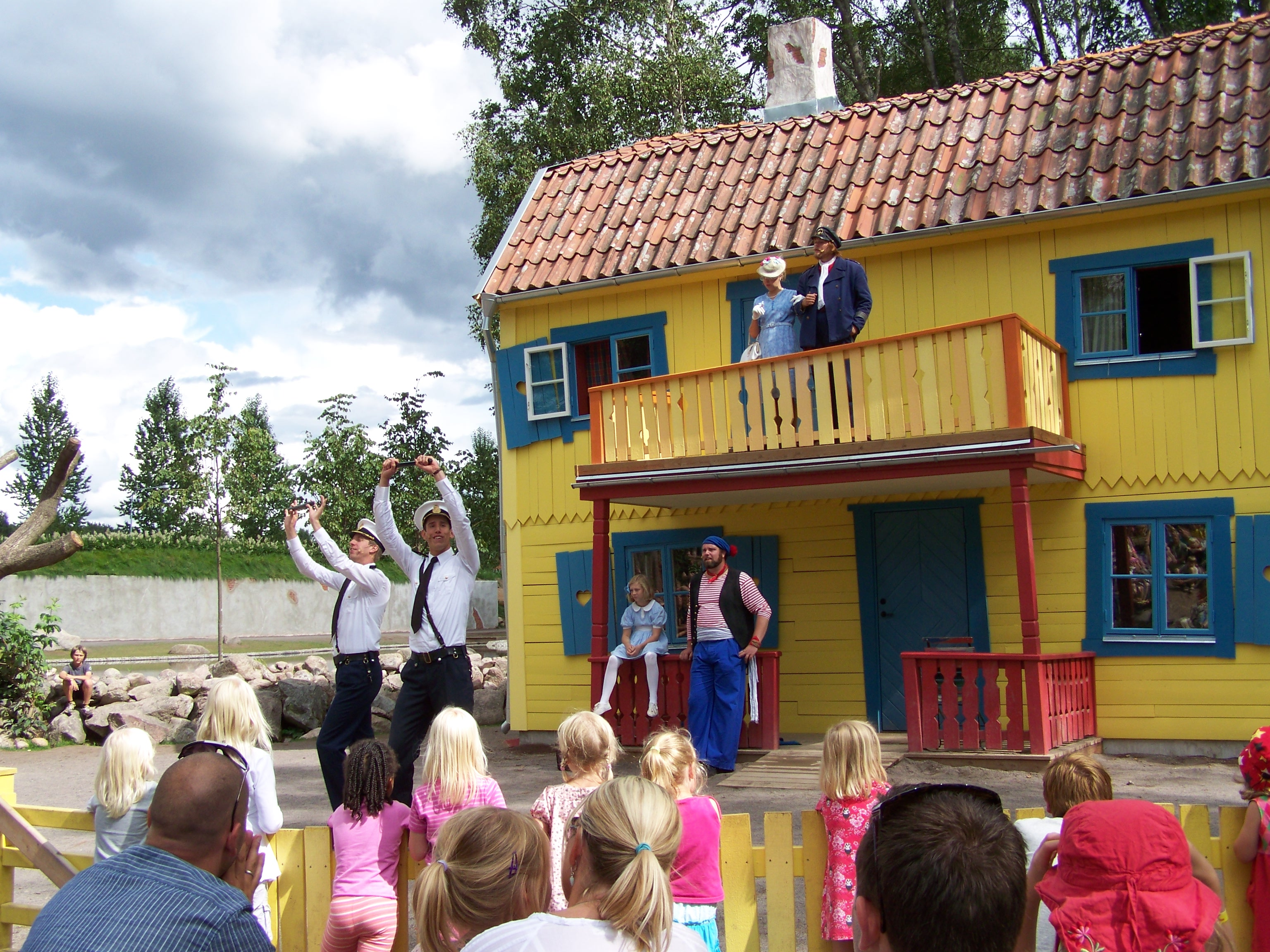 Astrid Lindgrens Värld, neue Villa Kunterbunt (2009-08-xx).